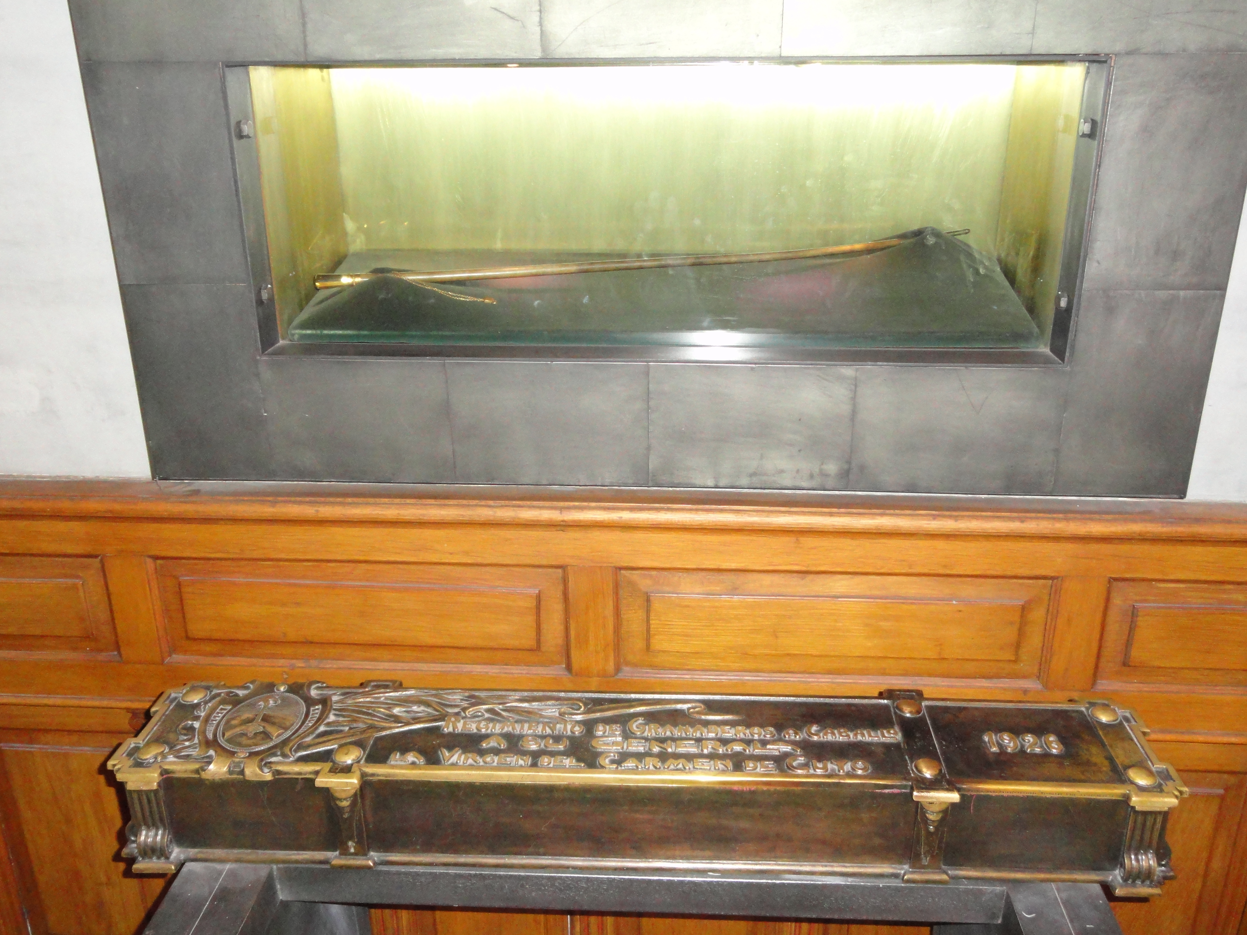 Bastón de mando del General José de San Martín, entregado por éste a la Virgen del Carmen de Cuyo, a quien nombrara Patrona y Generala del Ejército de los Andes.